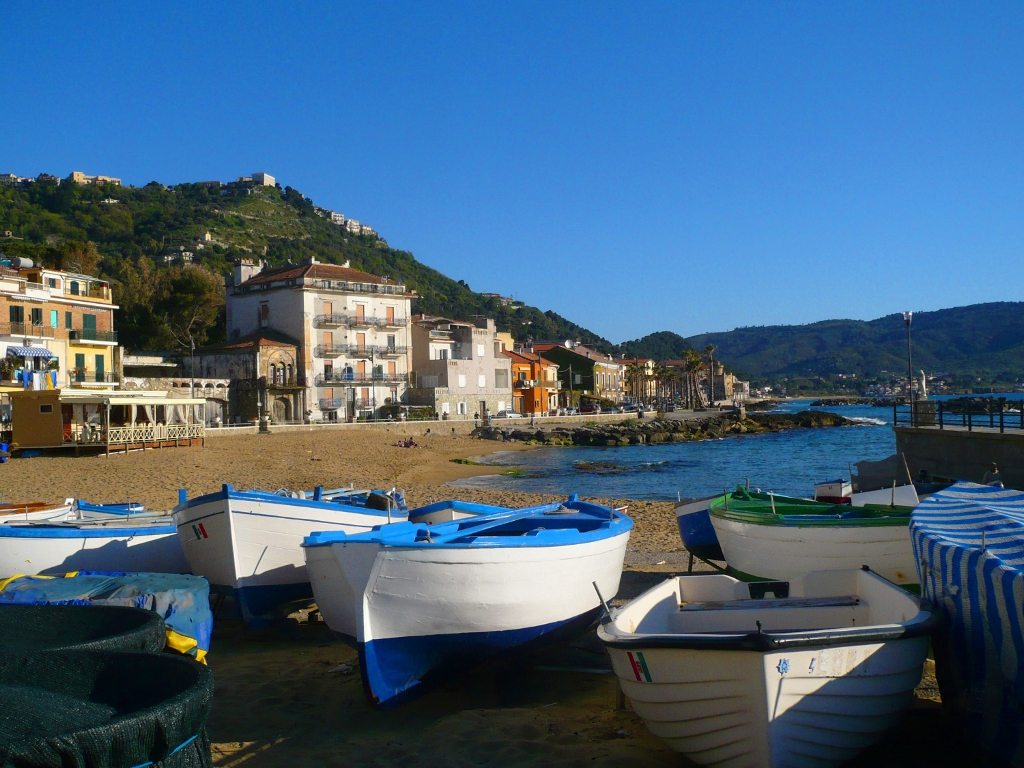 La spiaggia dello Scario a punta dell'Inferno nei pressi di Santa Maria di Castellabate (Salerno)